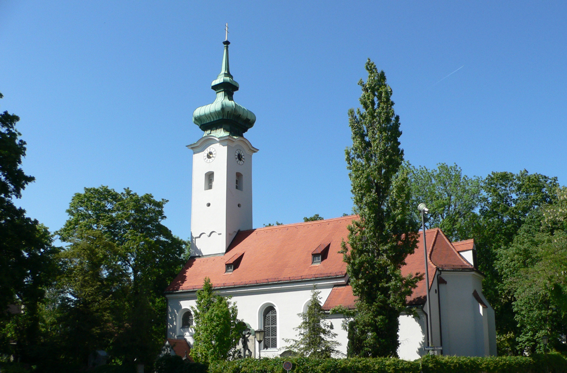 Church St. Georg in München Bogenhausen